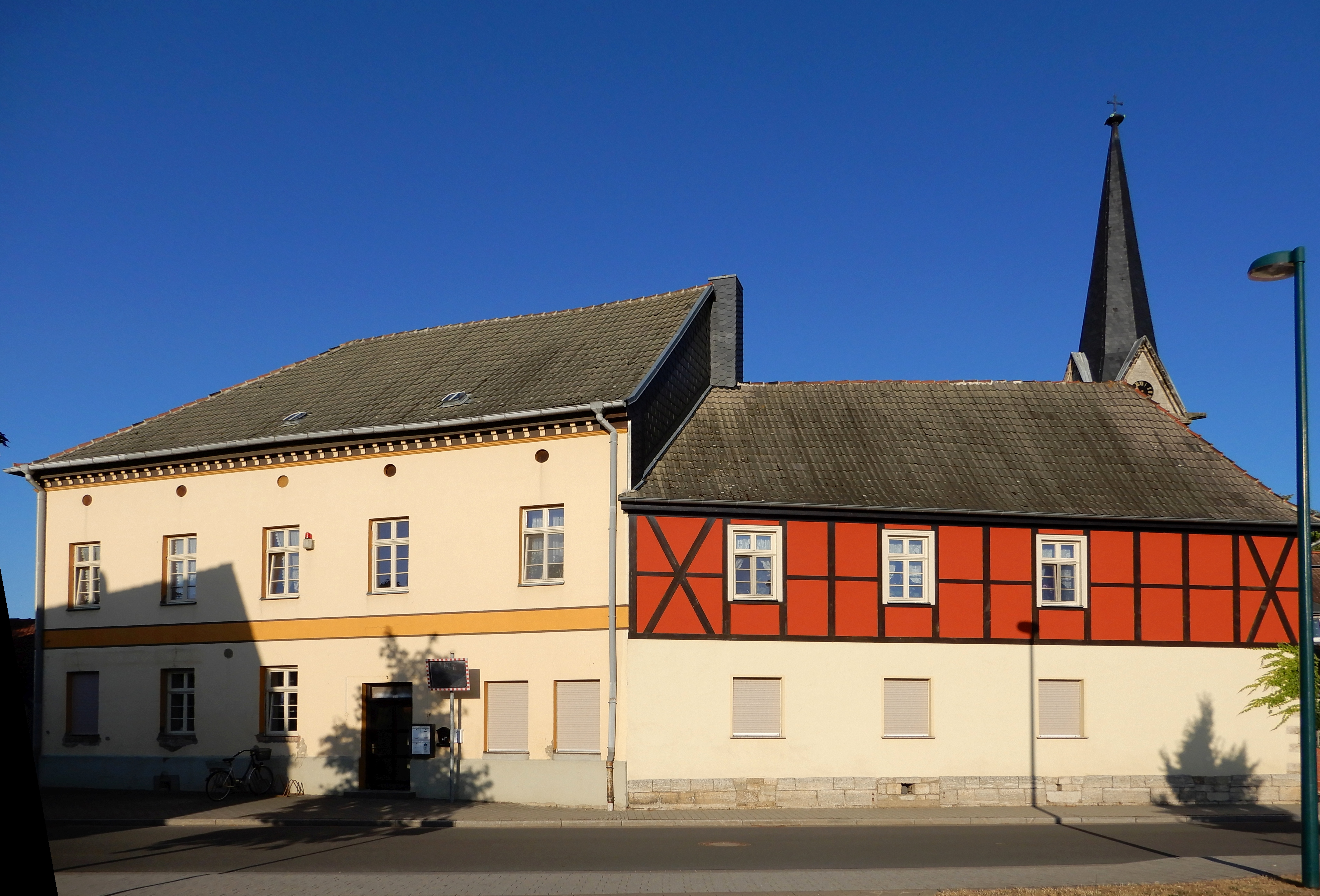 Gatersleben, Lange Straße 6